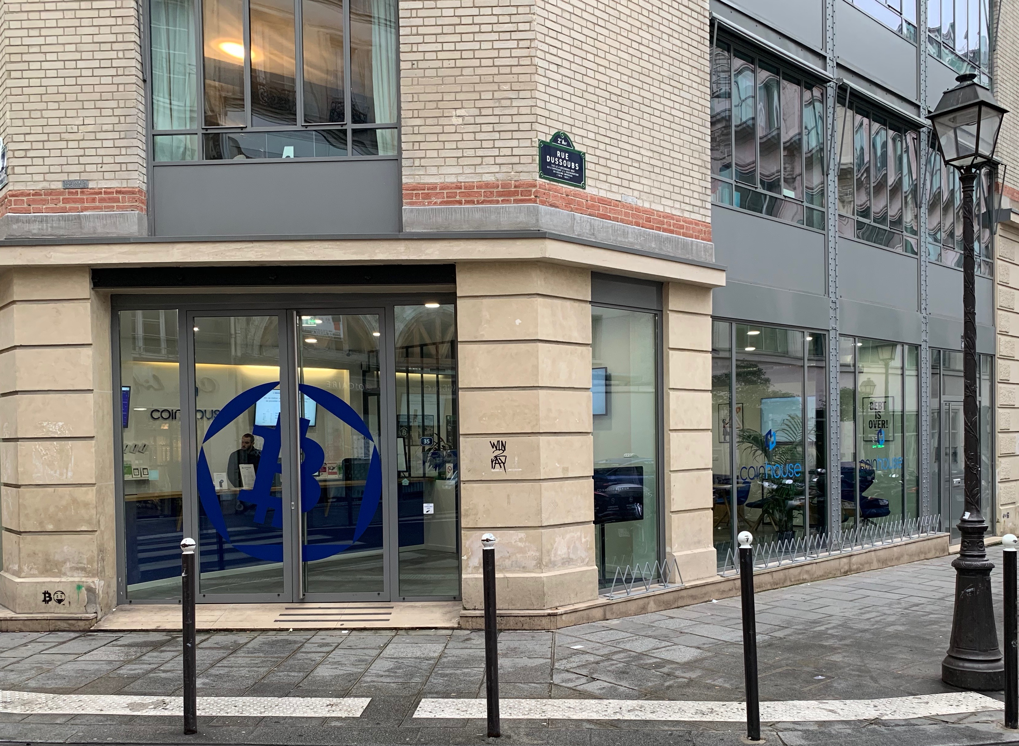 Photo de l'extérieur du Coinhouse Store, 35 rue du Caire